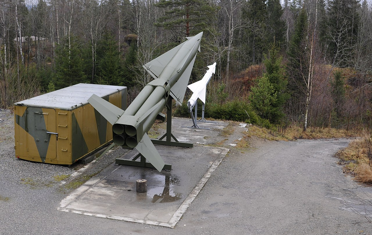 Utstilling av NIKE-batteriet ved Trøgstad fort i Østfold